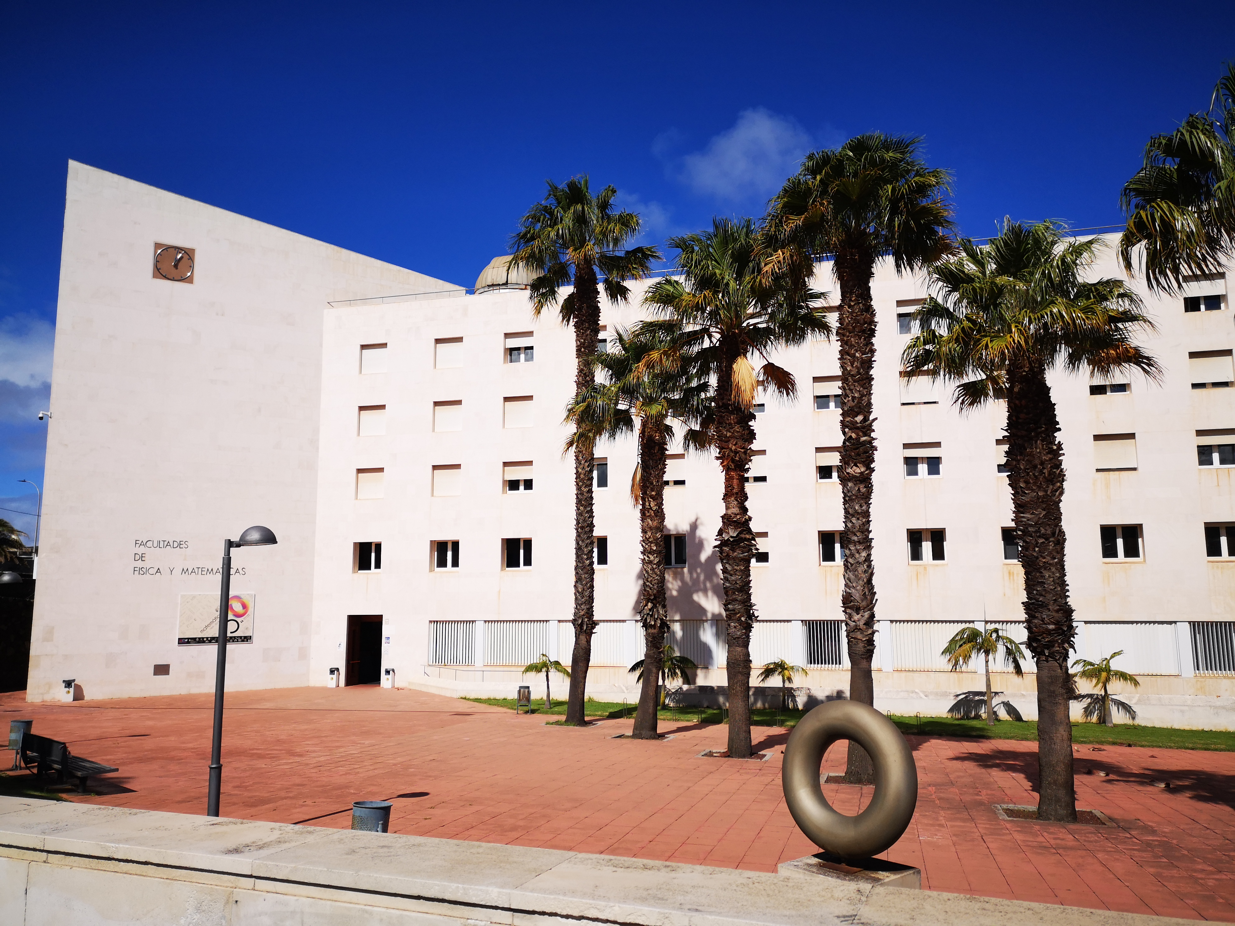 Edificio que alberga la Facultad de Matemáticas y la Facultad de Física, visto desde la Facultad de Biología. Universidad de La Laguna